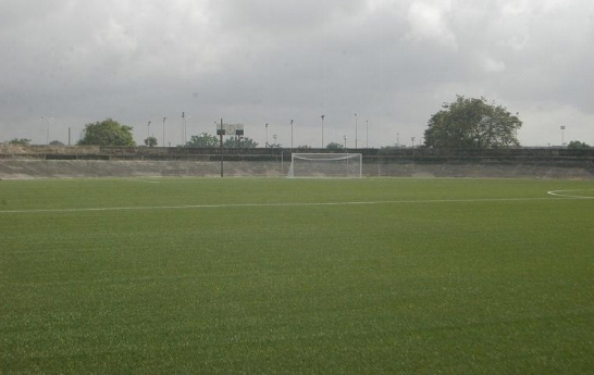 source : photo personelle